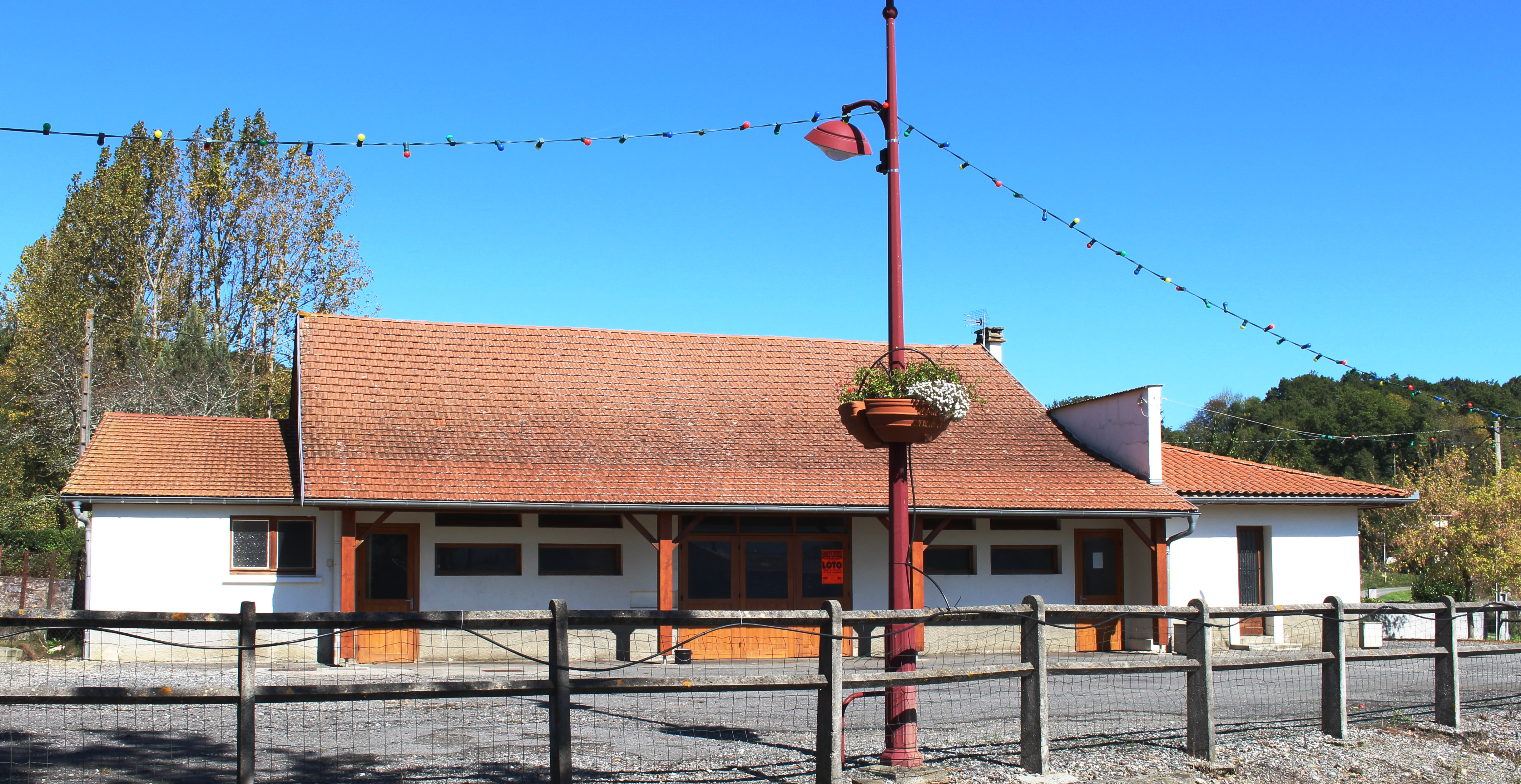 Salle des fêtes de Saint-Paul (Hautes-Pyrénées)